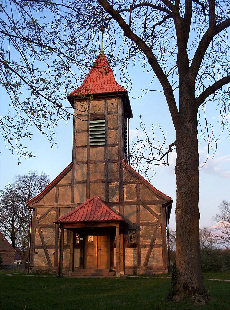 Chłopowo (powiat myśliborski) - kościół